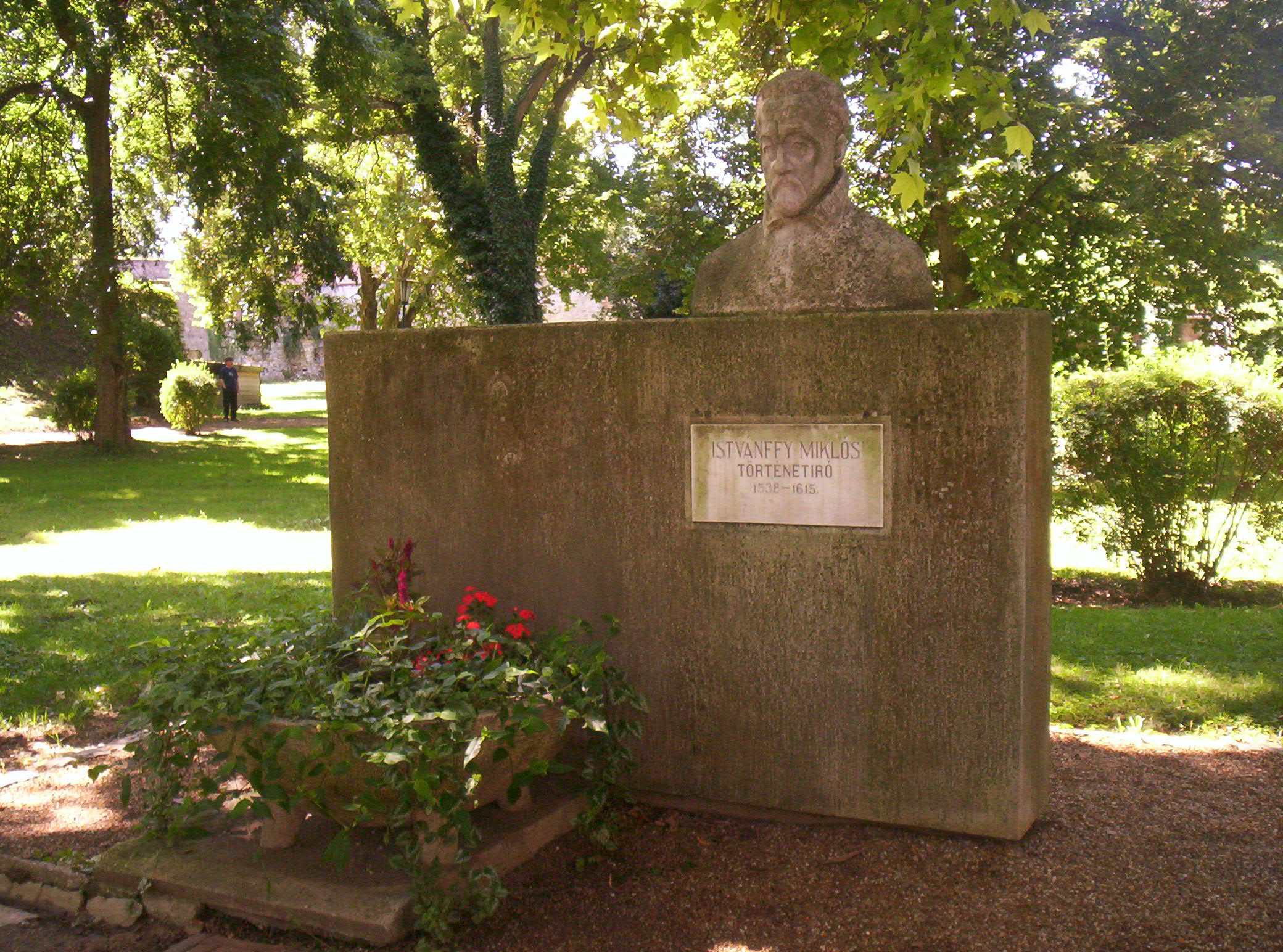 Istvánffy Miklós történetíró szobra a Szigetvári várban – – photo taken by uploader User:Csanády in 2006.